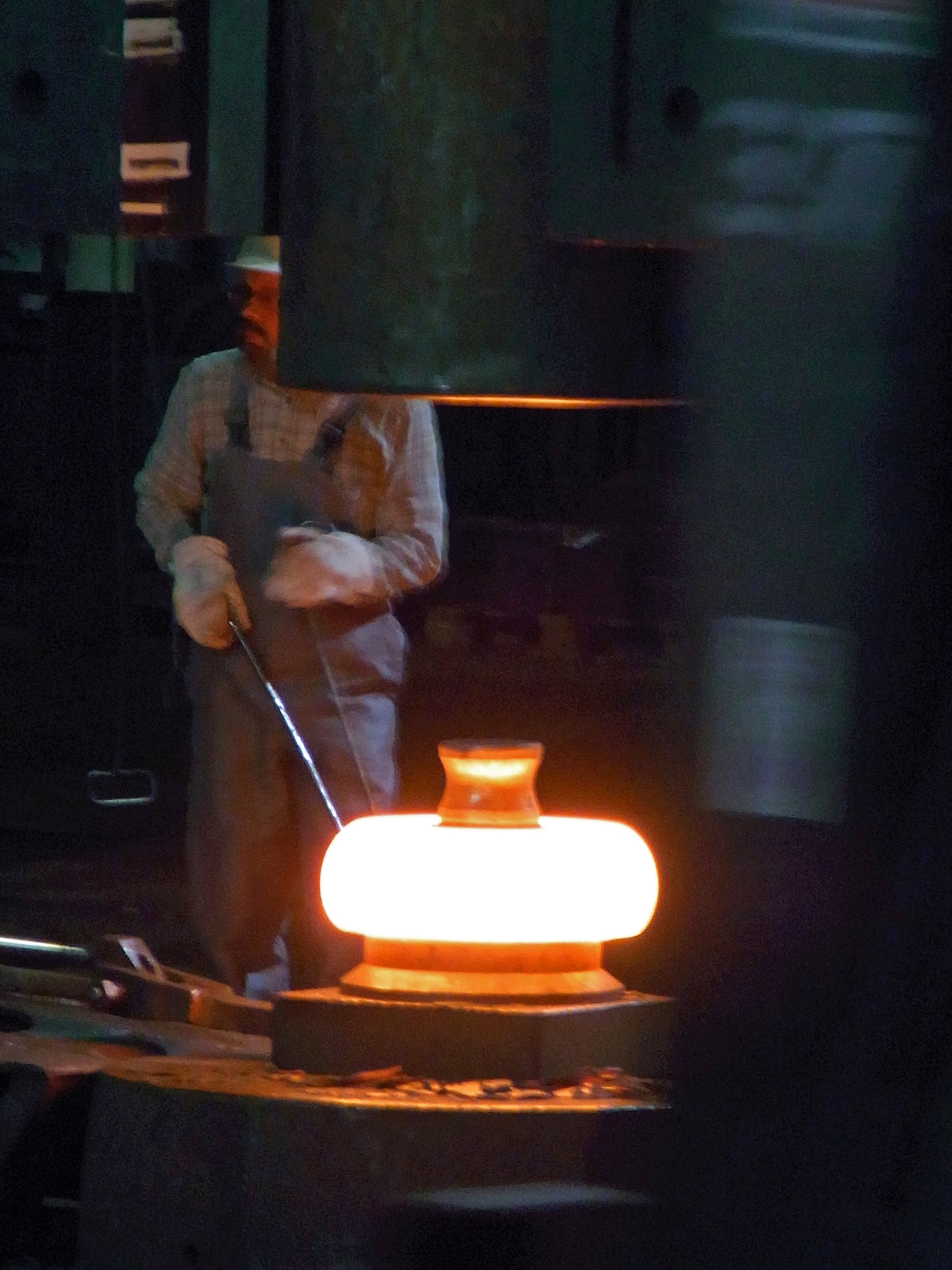 ExtraSchicht 2010 Radreifenproduktion im Bochumer Verein